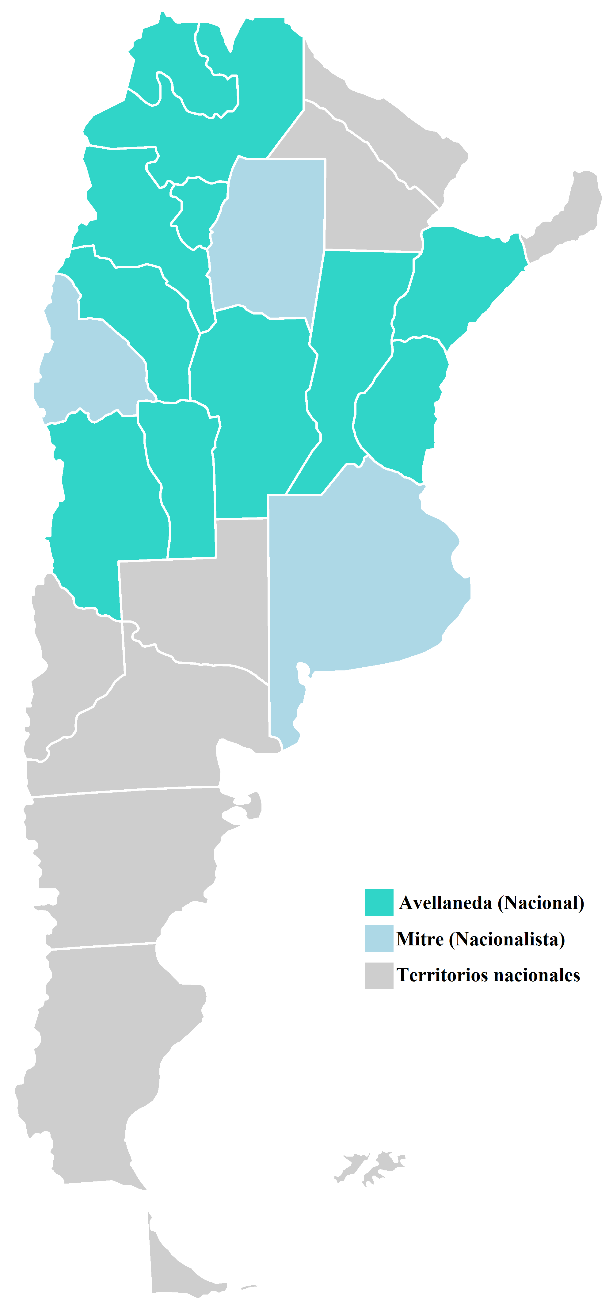 Mapa del resultado de las elecciones presidenciales de Argentina de 1874 por provincia.